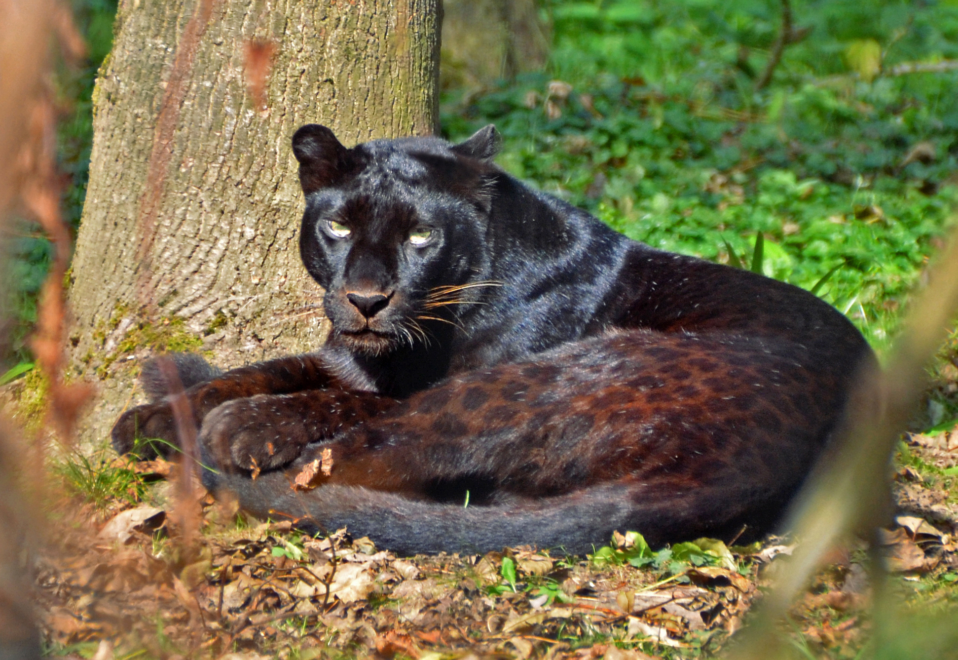 Panthère Noire au parc des Félins de Lumigny